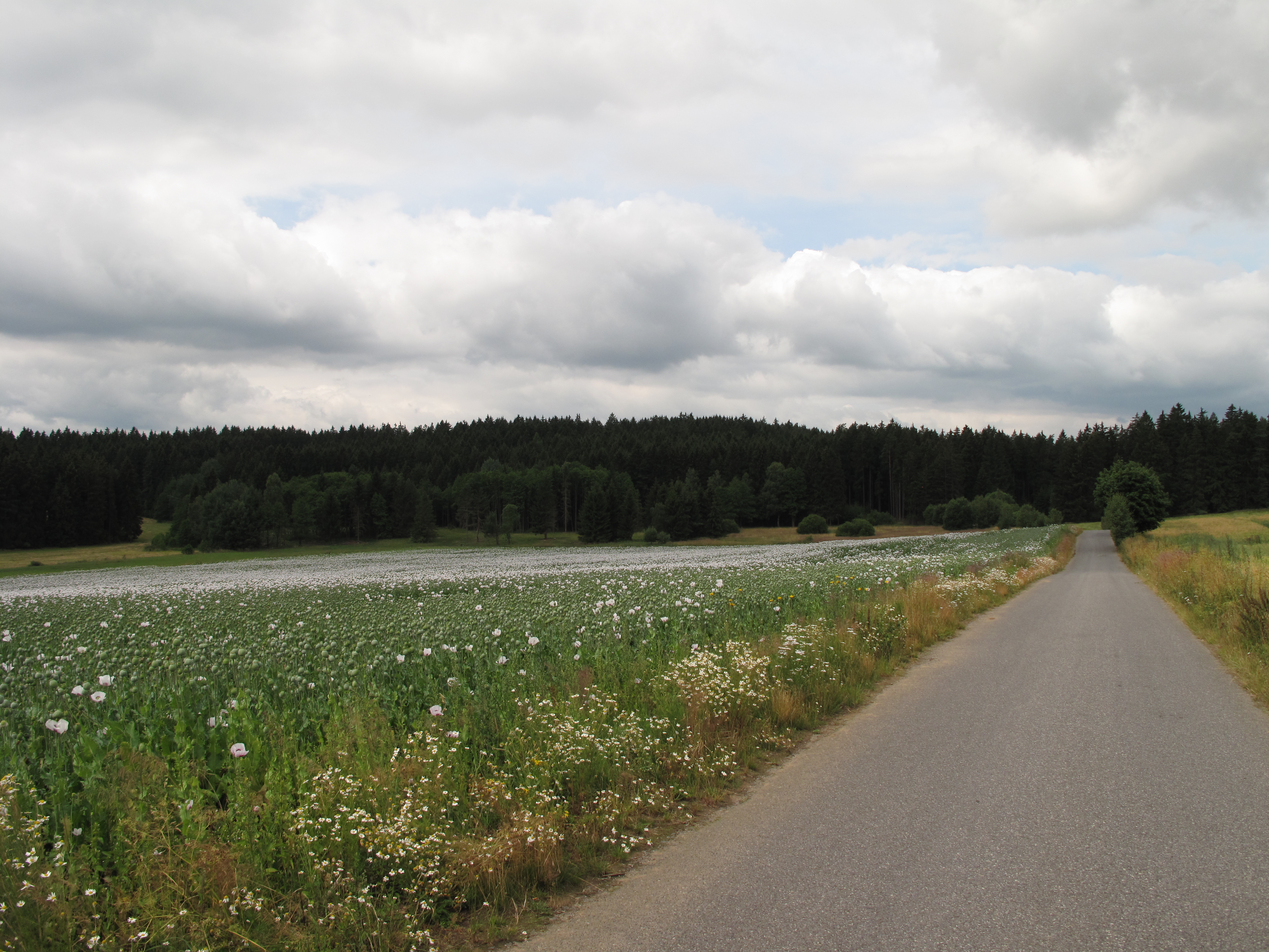 Přírodní památka Jezdovické rašeliniště. Okres Jihlava, Česká republika.